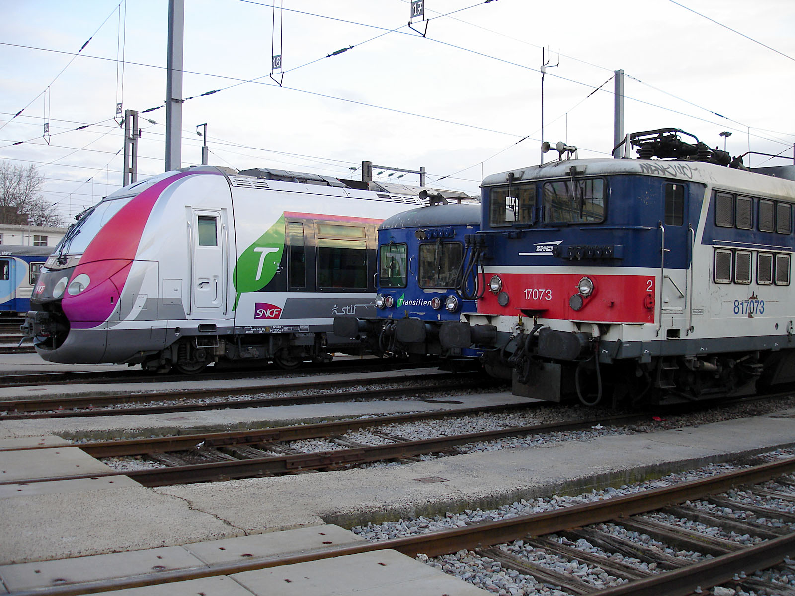 Vue d'une Z 50000, d'une rame inox de banlieue (RIB) et d'une BB 17000 sur le faisceau de voies du technicentre Paris Nord-Joncherolles, Villetaneuse, Seine-Saint-Denis, France.